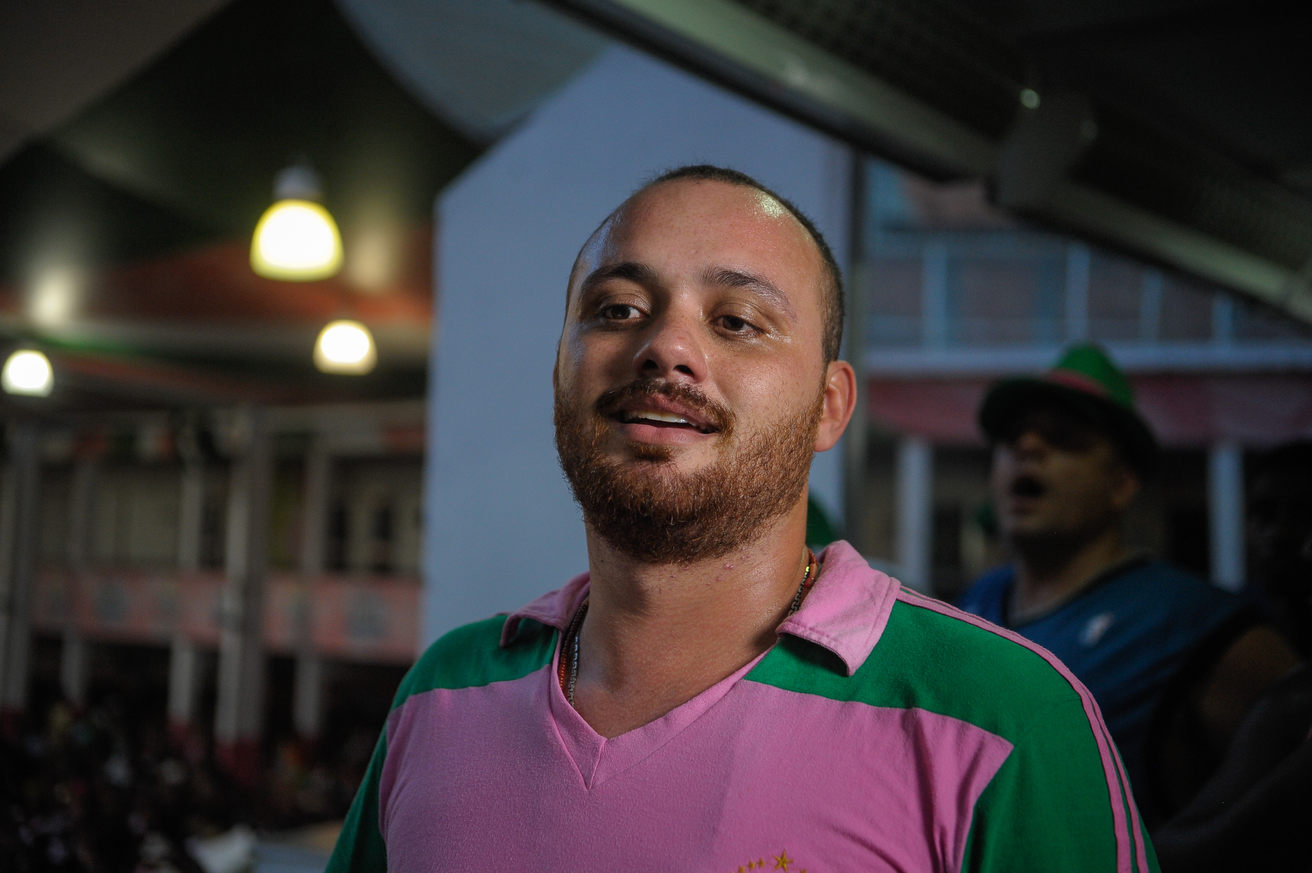 Rio de Janeiro - Carnavalesco da Mangueira, Leandro Vieira comemoração na quadra da escola do título de campeã no carnaval de 2016 do Grupo Especial do Rio (Tomaz Silva/Agência Brasil)